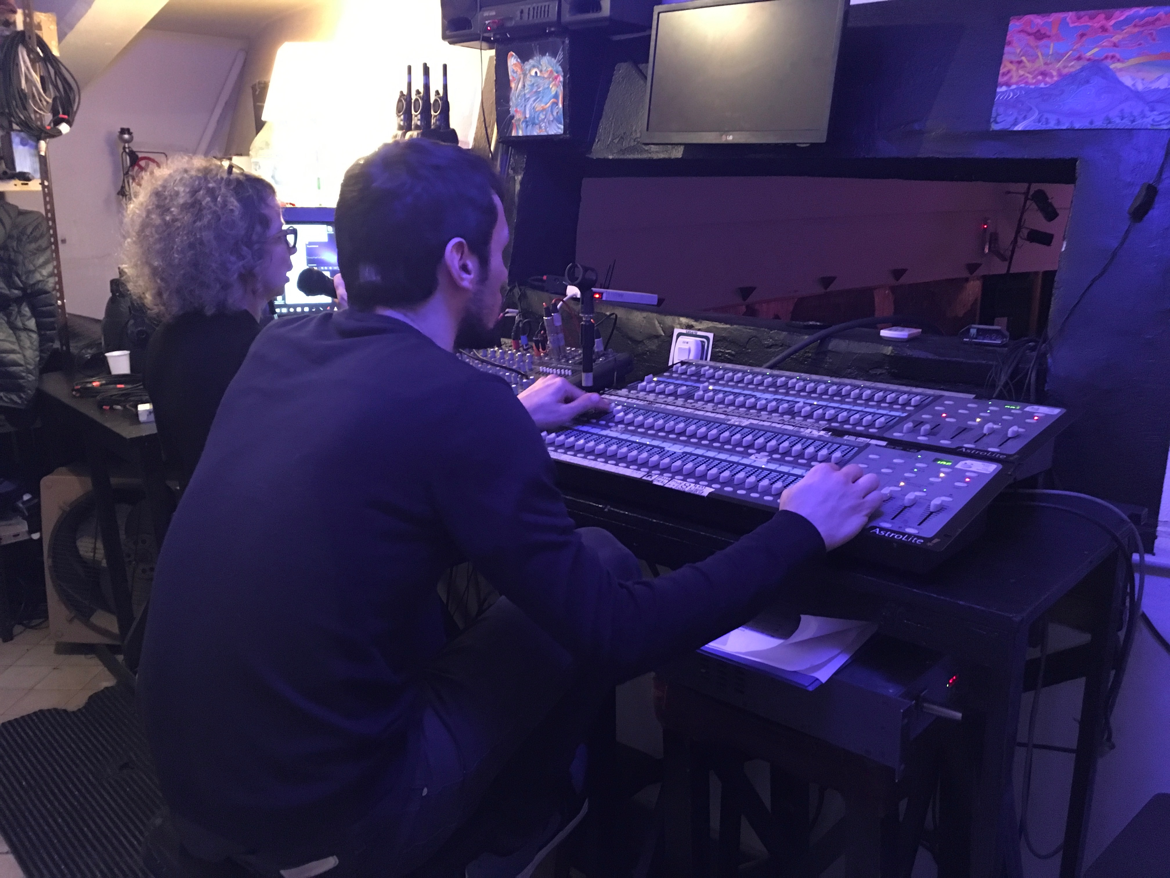 Sala de control del Teatro Empire. Calle Hipólito Yrigoyen 1934 (Buenos Aires).